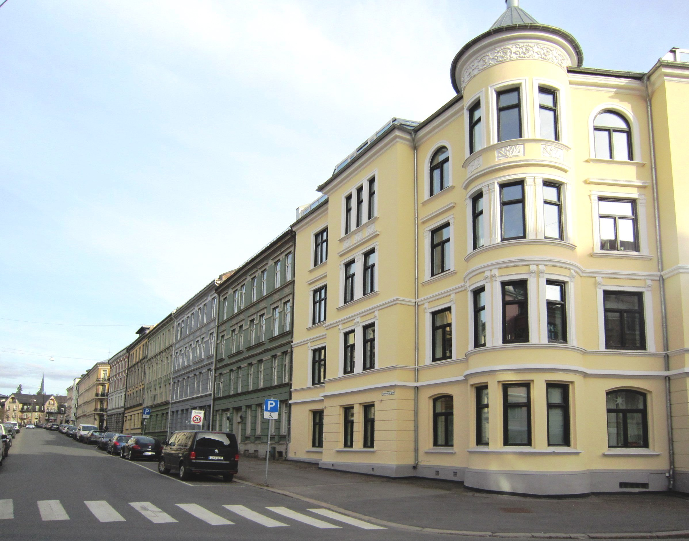 Eckersbergs gate sett fra Thomas Heftyes gate